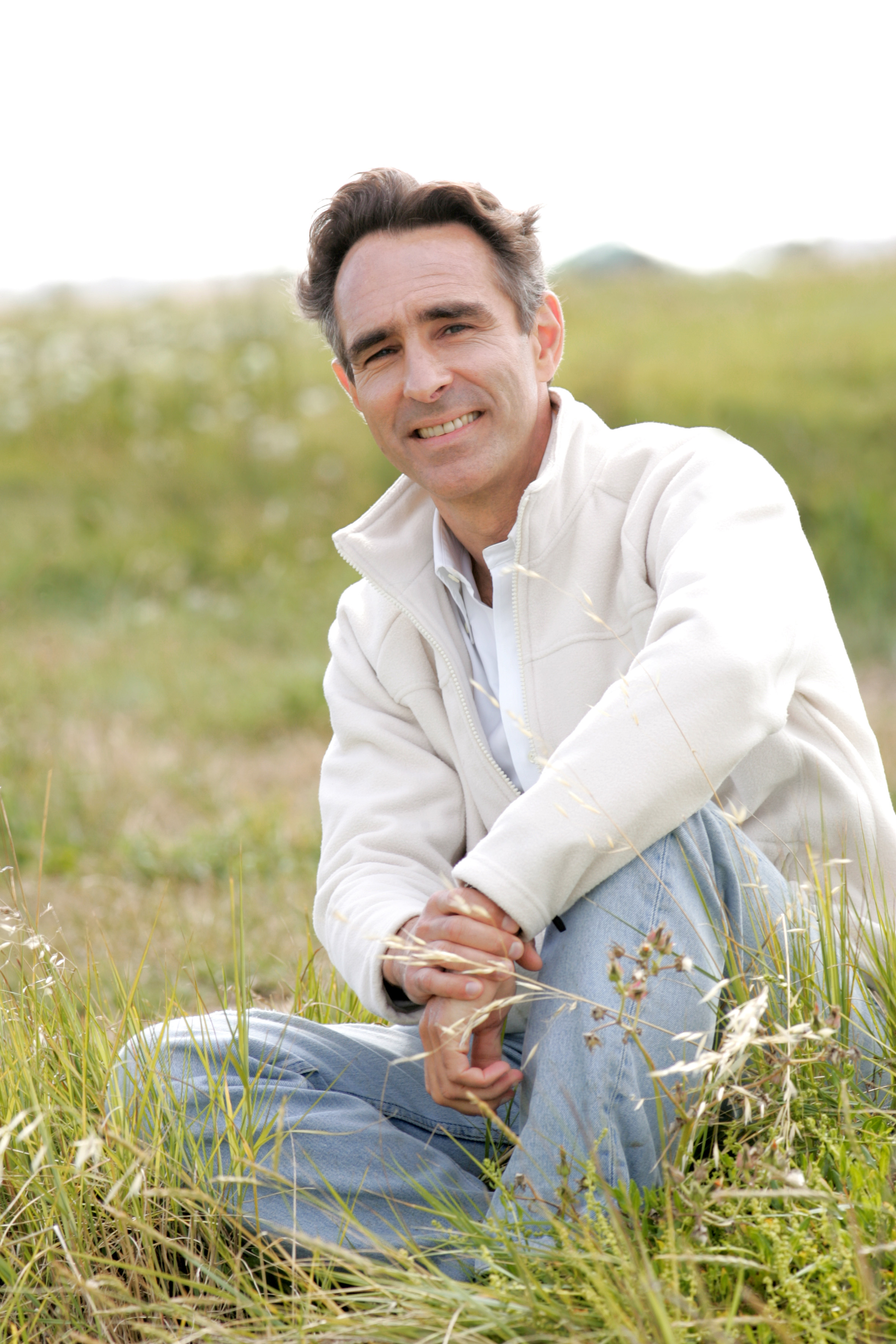 David Servan-Schreiber lors d'un séjour à l'Ile de Ré. 2007. Photo: Robert Espalieu